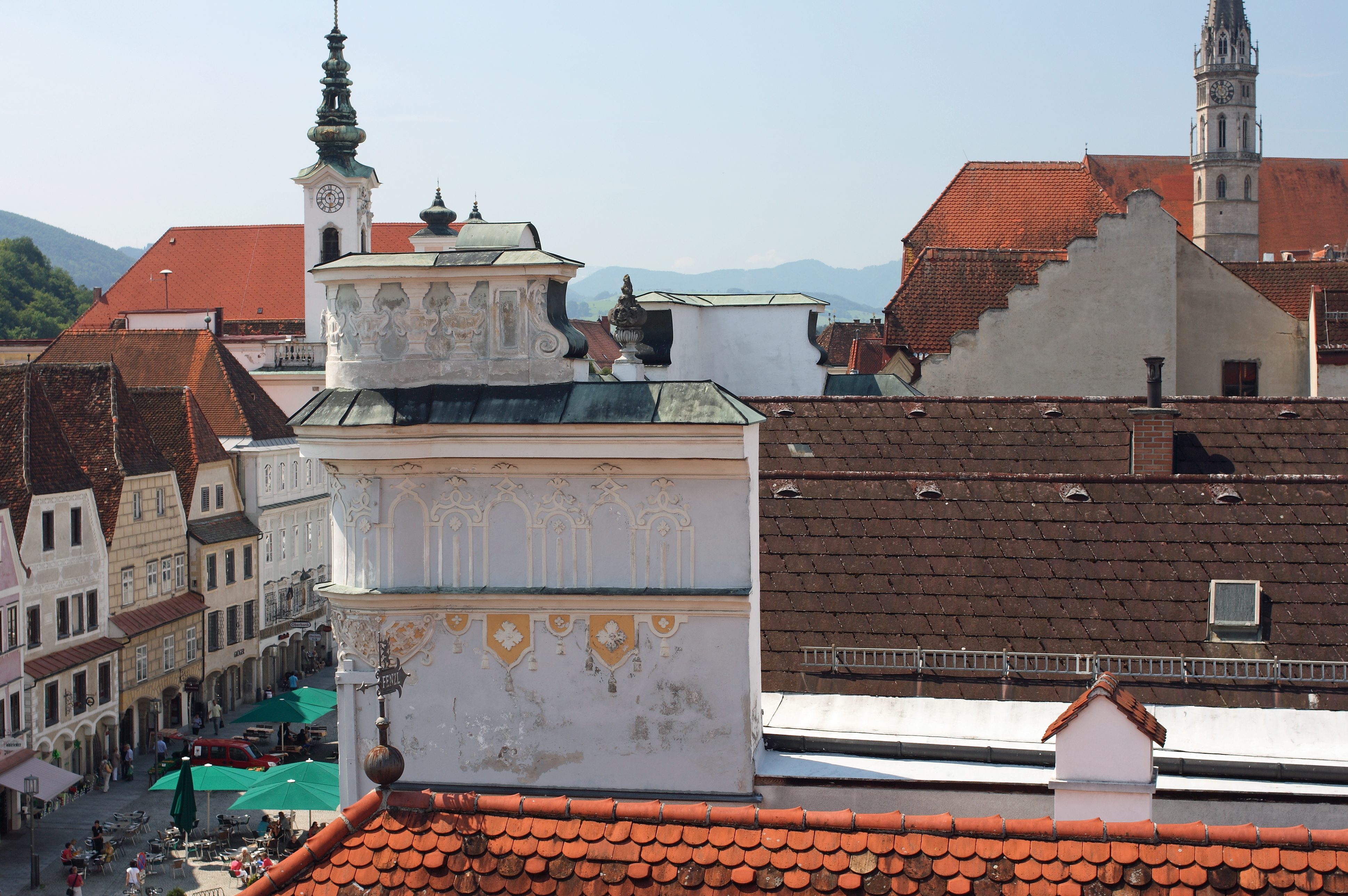 Blendfassade und Dach des Sternhauses am Steyrer Stadtplatz. Aufnahme von der Dachterrasse des Hartlauerhauses